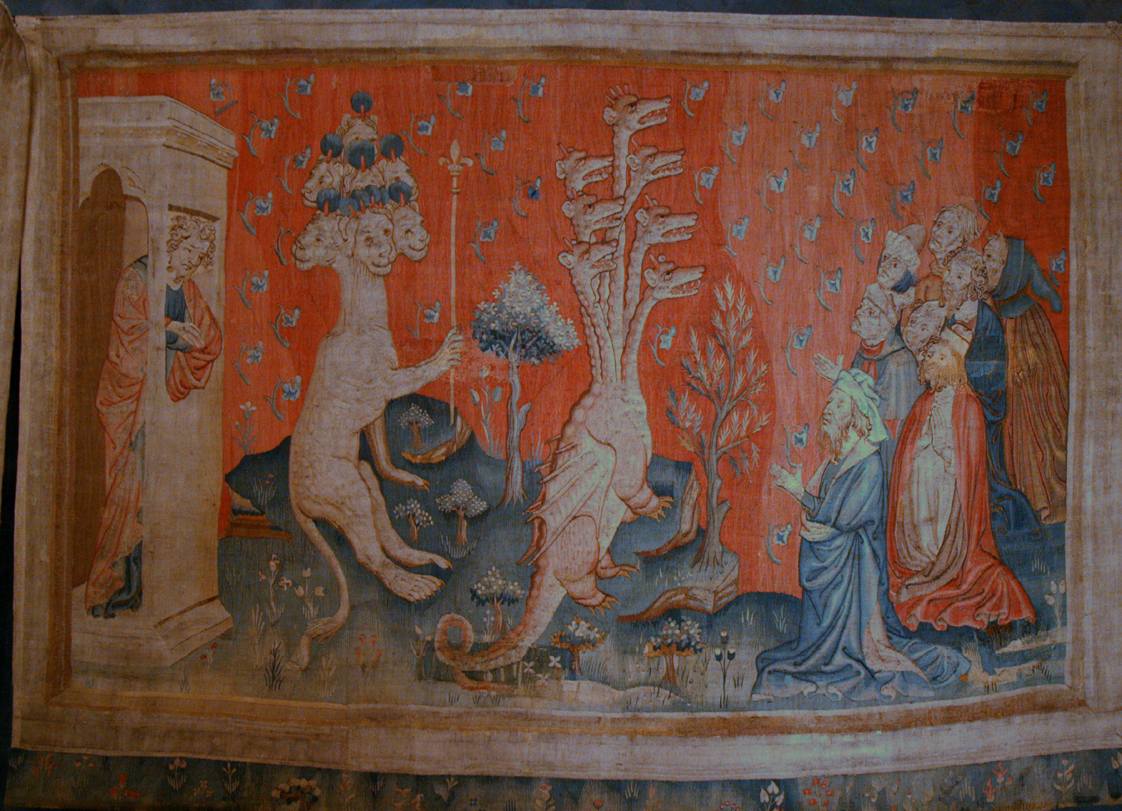 Tenture de l'Apocalypse au château d'Angers